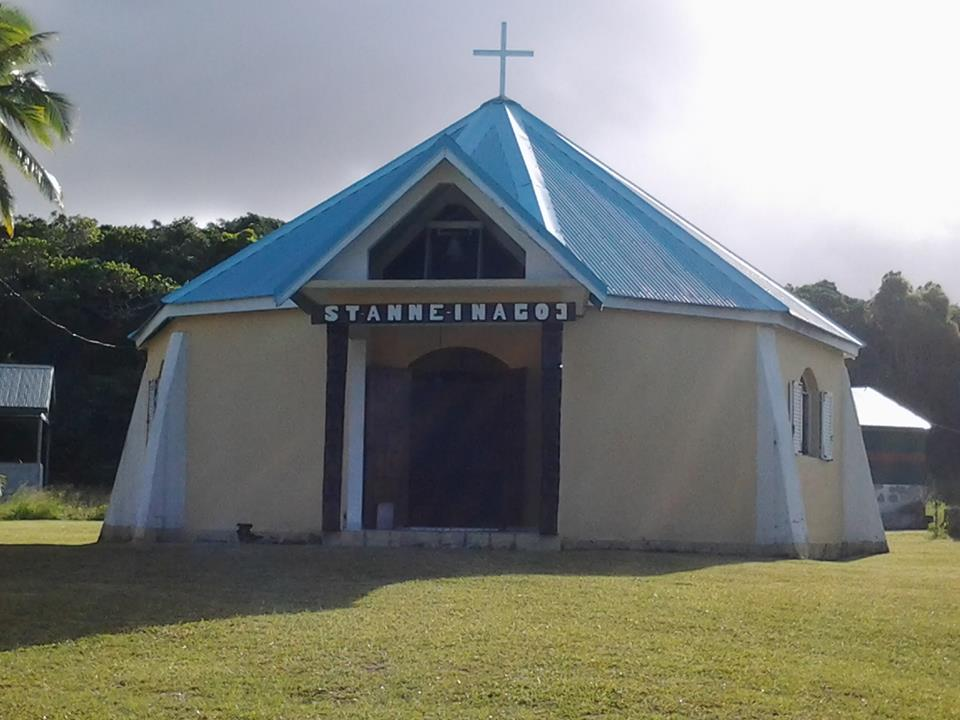 Chapelle Saint-Anne d'Inagoj (photo 2014)